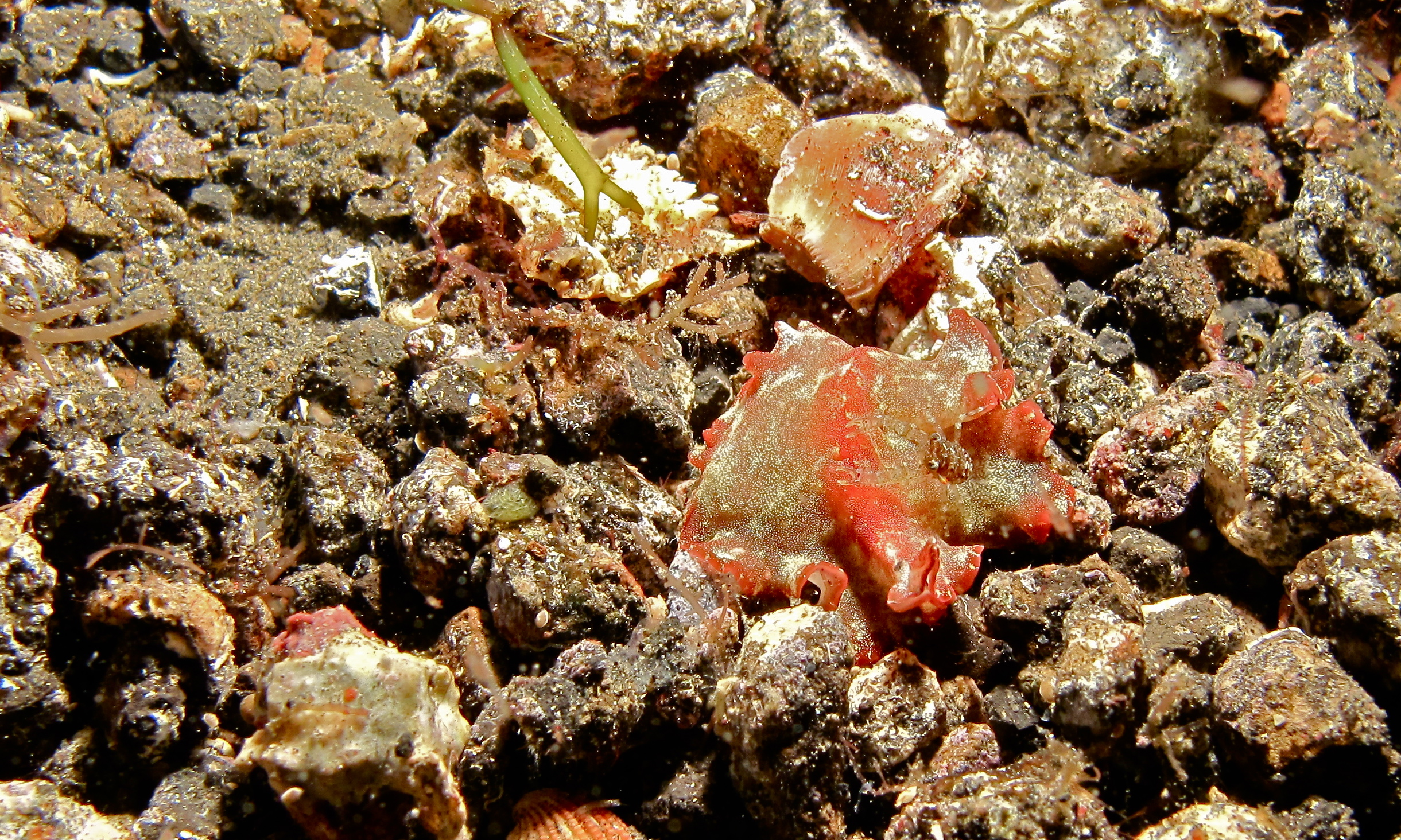 Jahir, Lembeh Strait, Sulawesi, INDONESIA